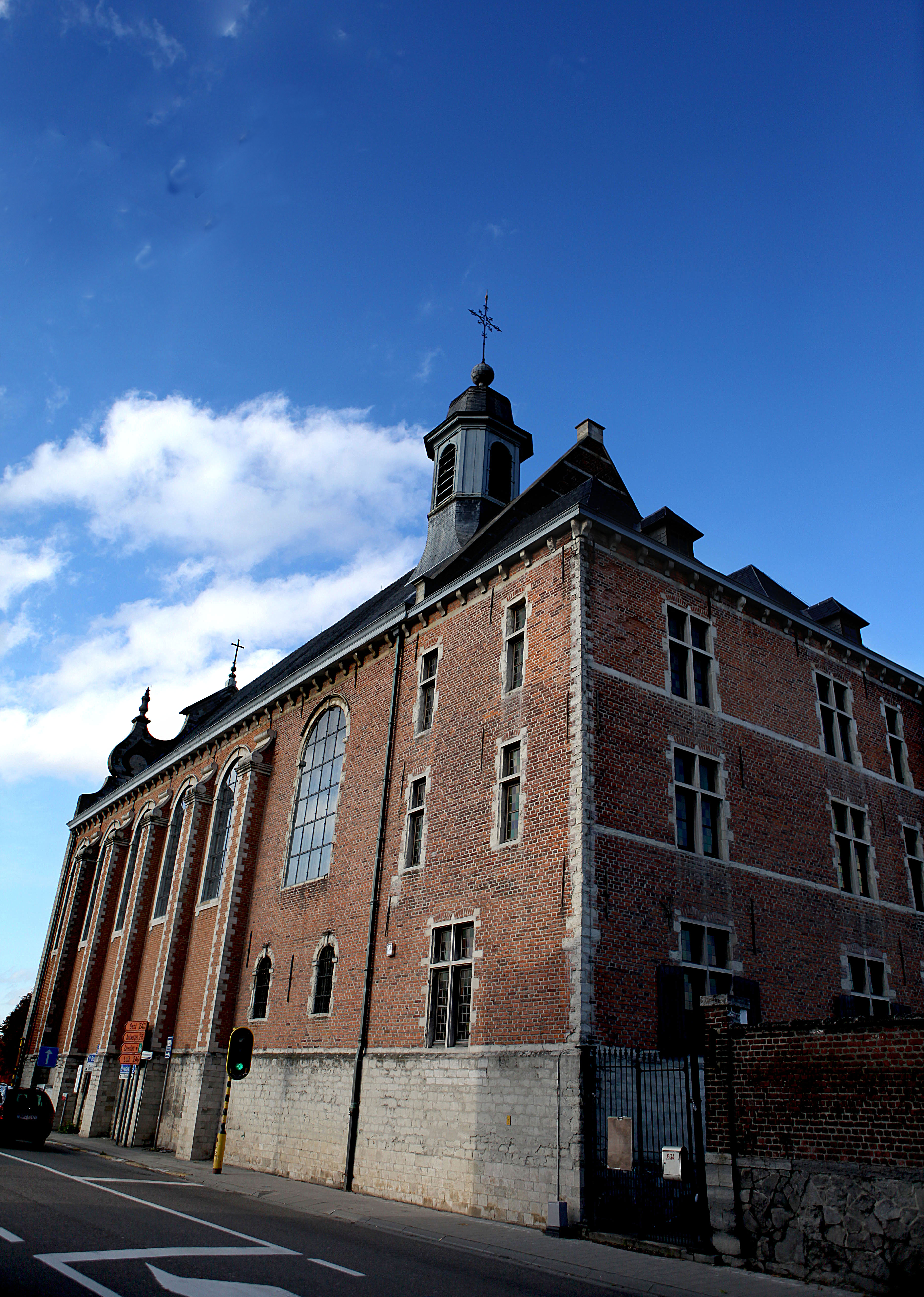 Façade sud-est avec presbytère de l'église Notre-Dame-au-Bois de Jezus-Eik